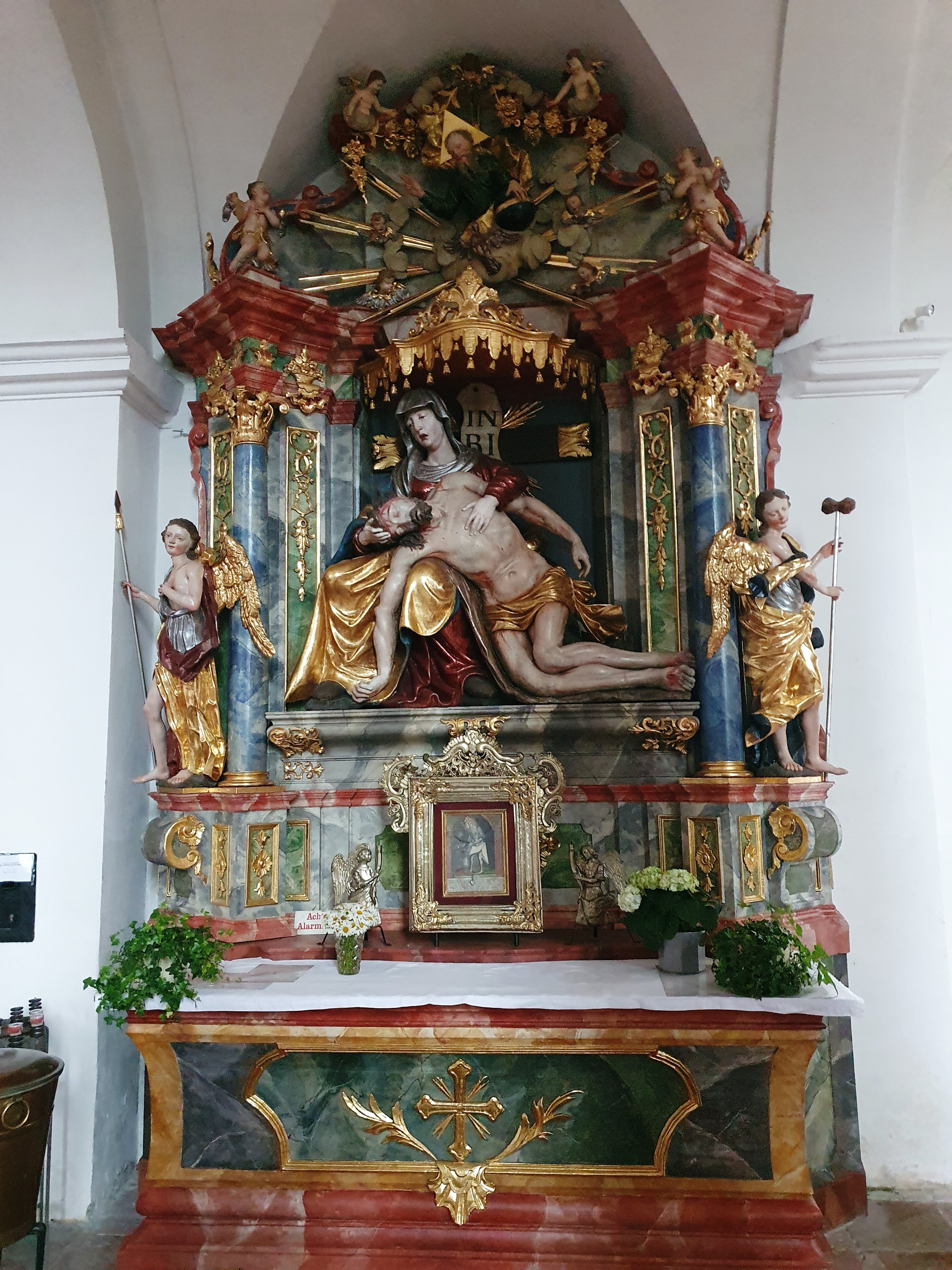 Altaraufbau von Leopold Fux, um 1750, mit Pietà